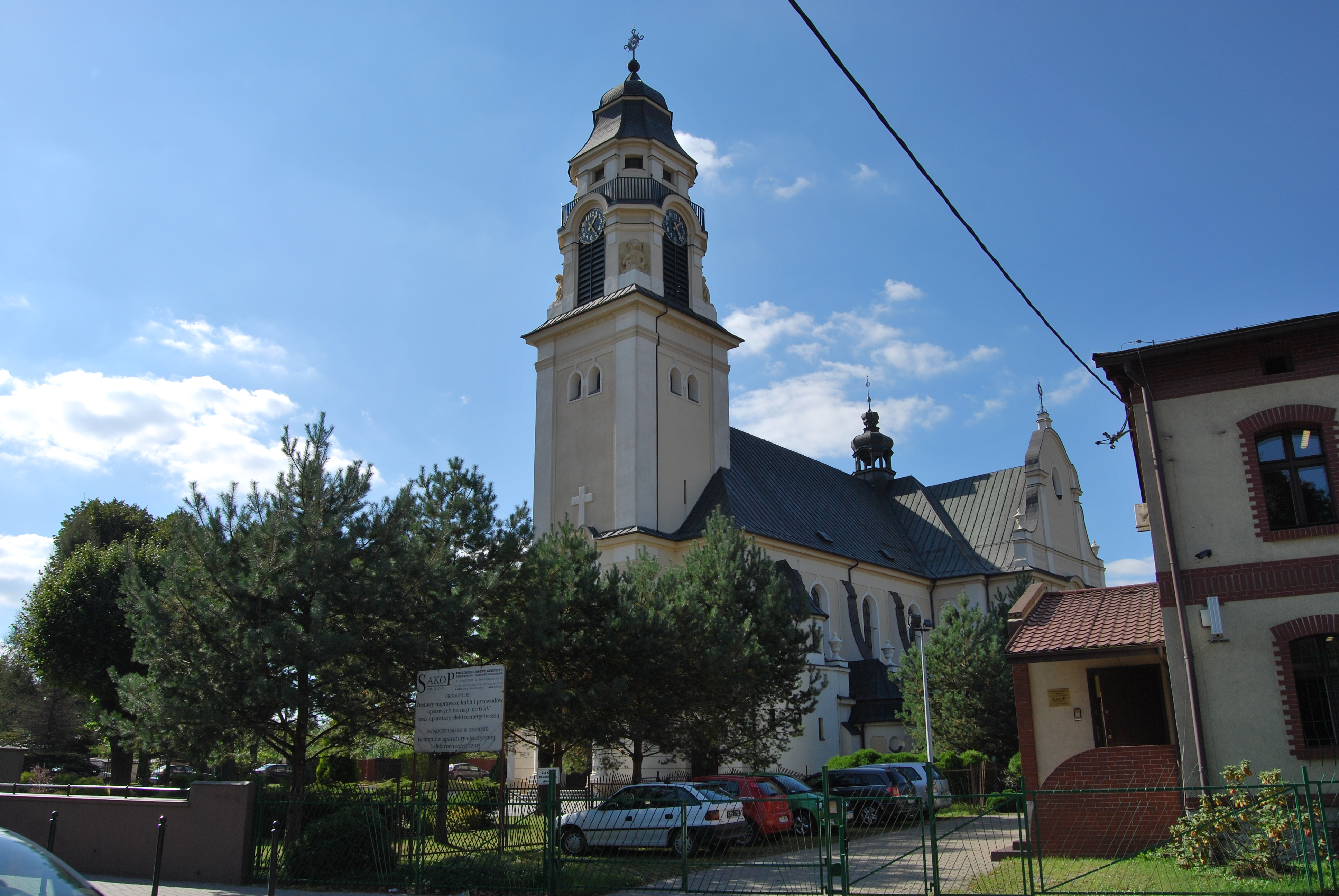 województwo śląskie, Bytom - Kościół parafialny pw. Bożego Ciała Bytom – Miechowice, ul. Stolarzowicka 13